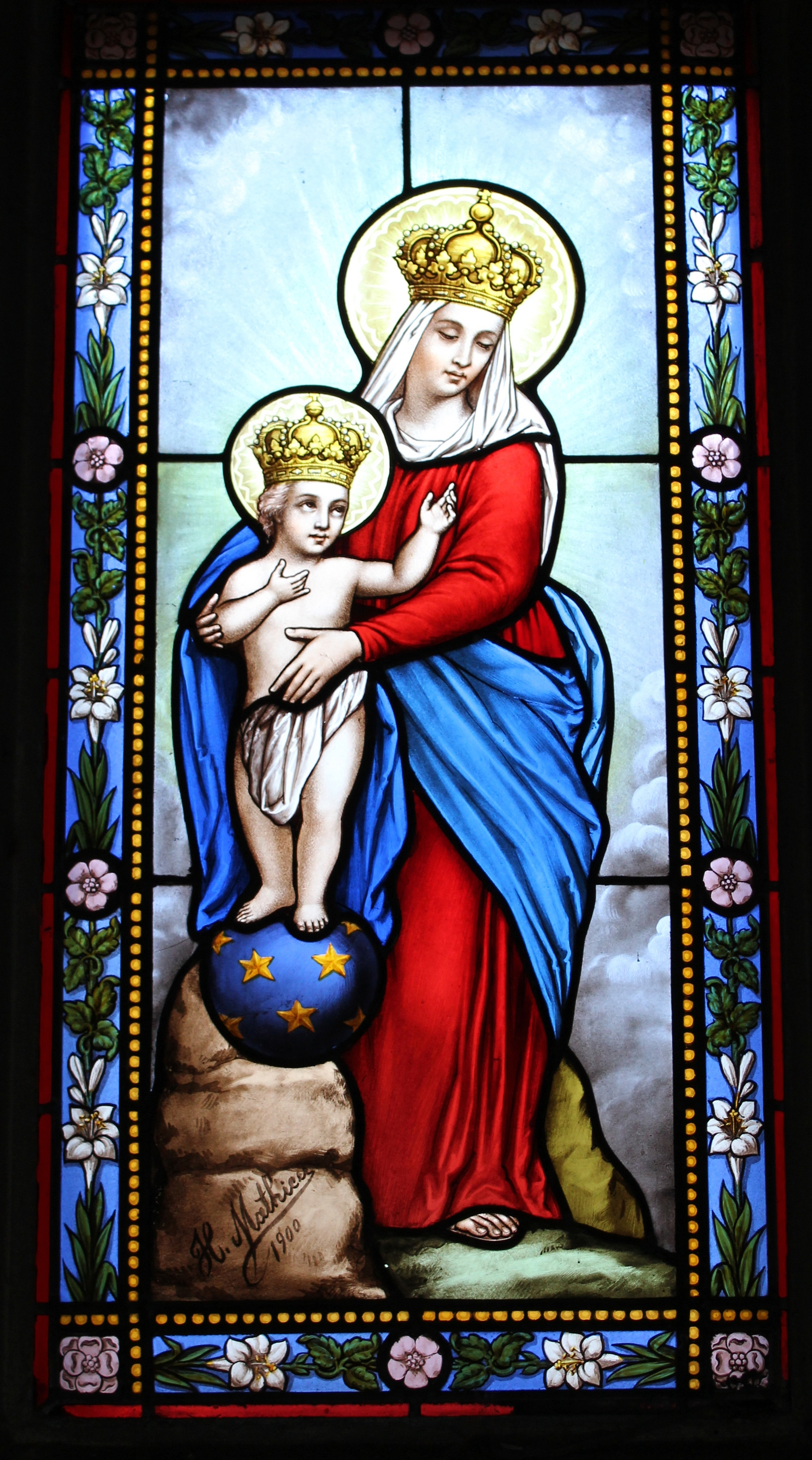 Chapelle ornée d'un vitrail signé H. Mathieu 1900.vitrail